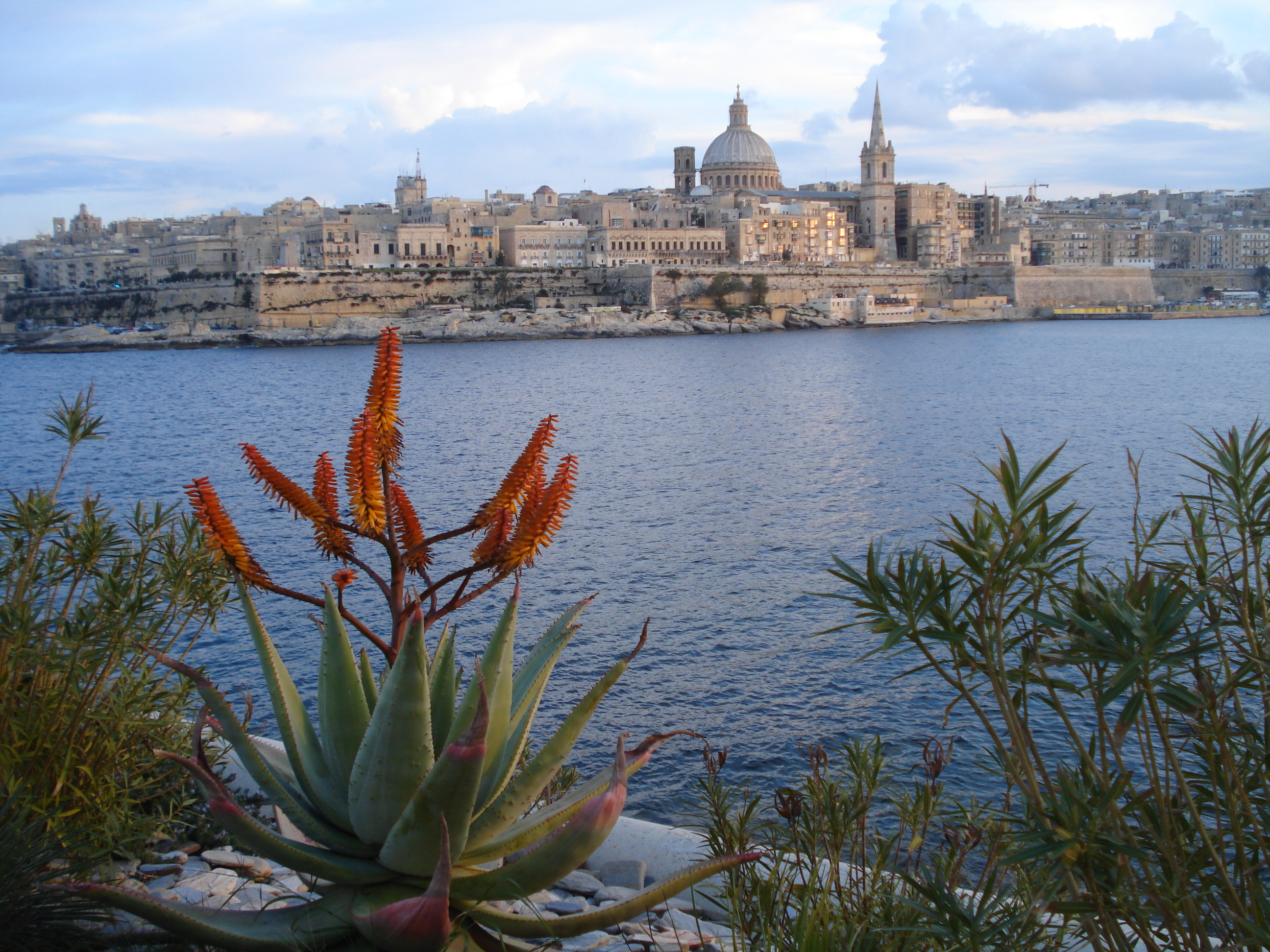 Blick von Sliema nach Valletta